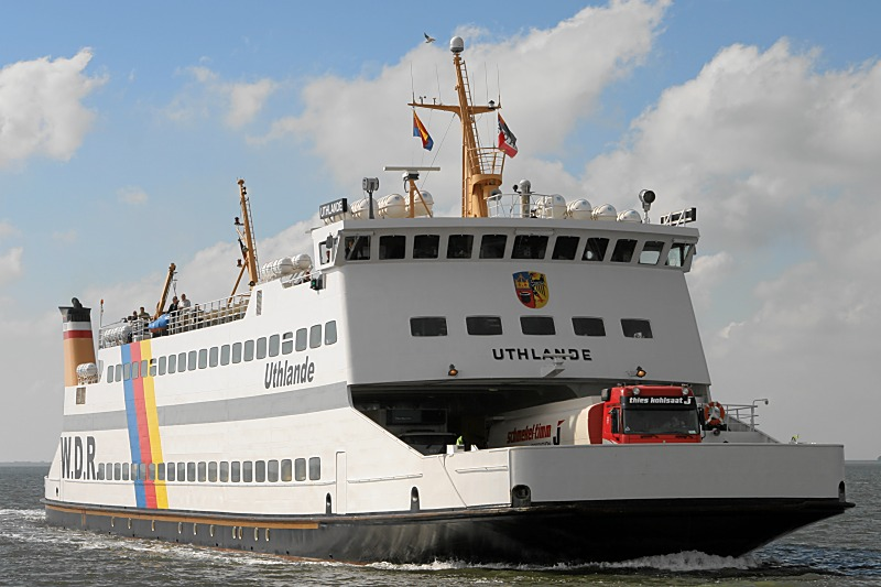 Ferry "MS Uthlande" of Wyker Dampfschiffs-Rederei Foehr-Amrum GmbH IMO Number: 7909619 MMSI Number: 211298110 Callsign: DJIQ Length: 67 m Beam: 13 m